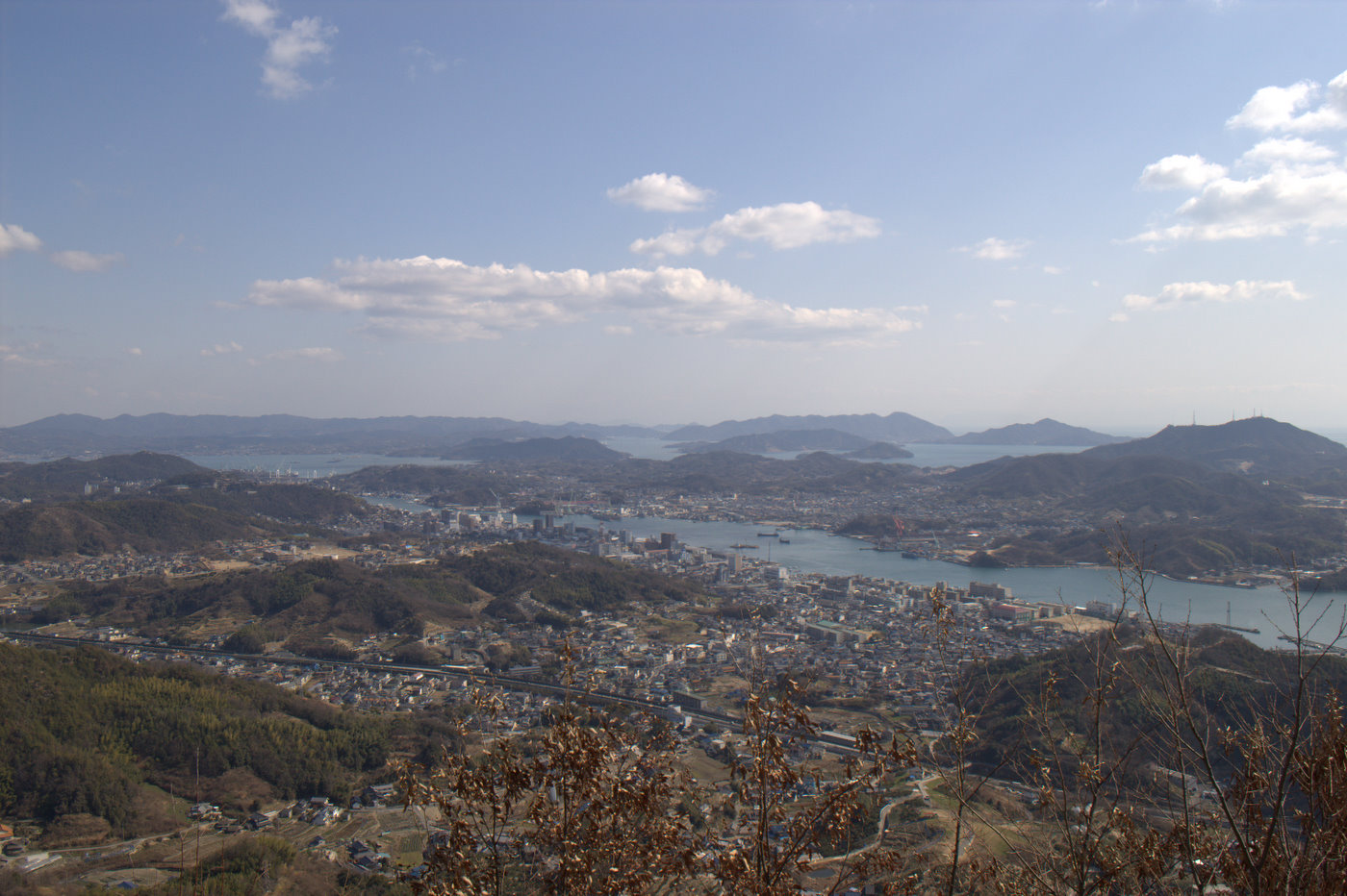 尾道眺望